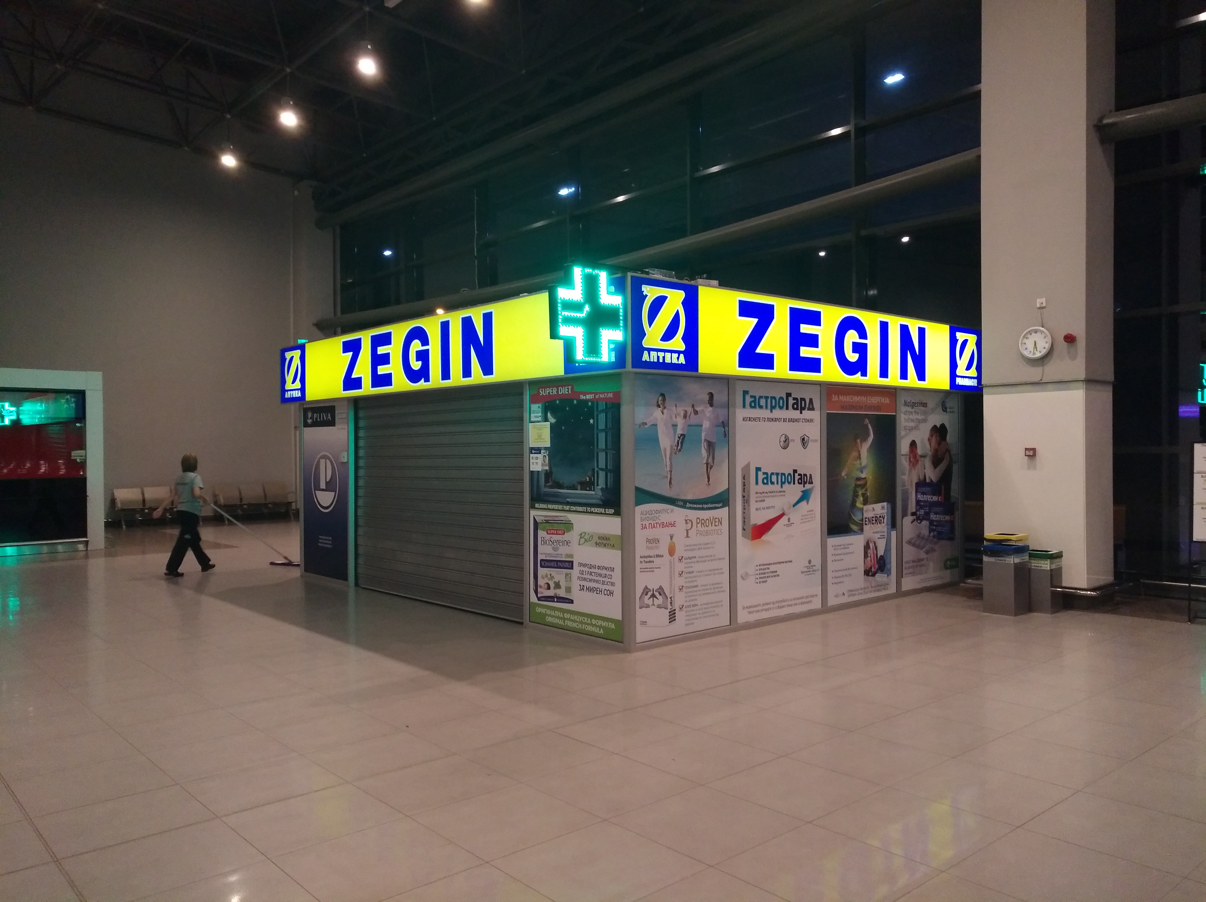 Pharmacie dans l'aéroport international de Skopje (Macédoine).